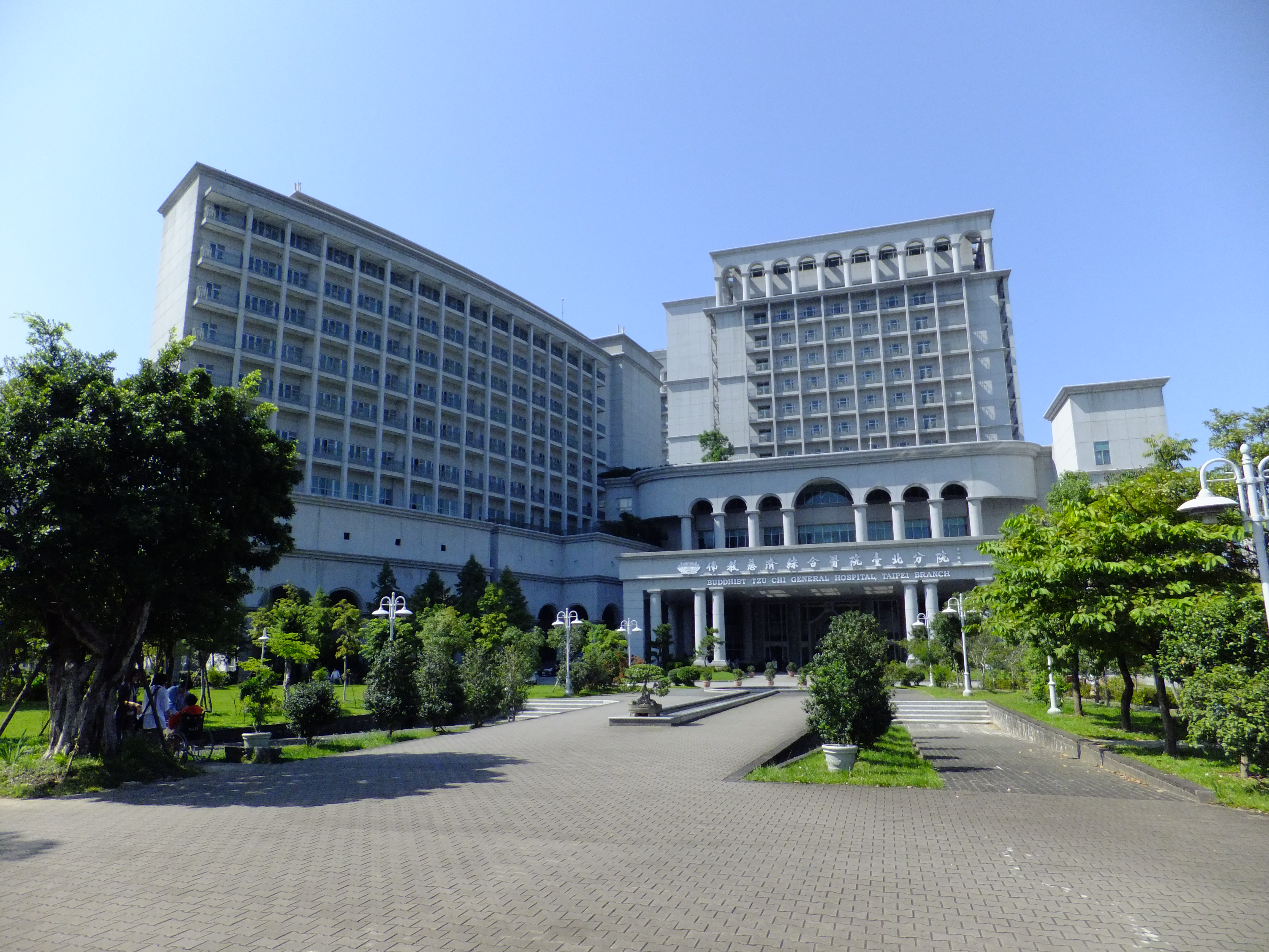 佛教慈濟綜合醫院臺北分院，地址：新北市新店區建國路289號。